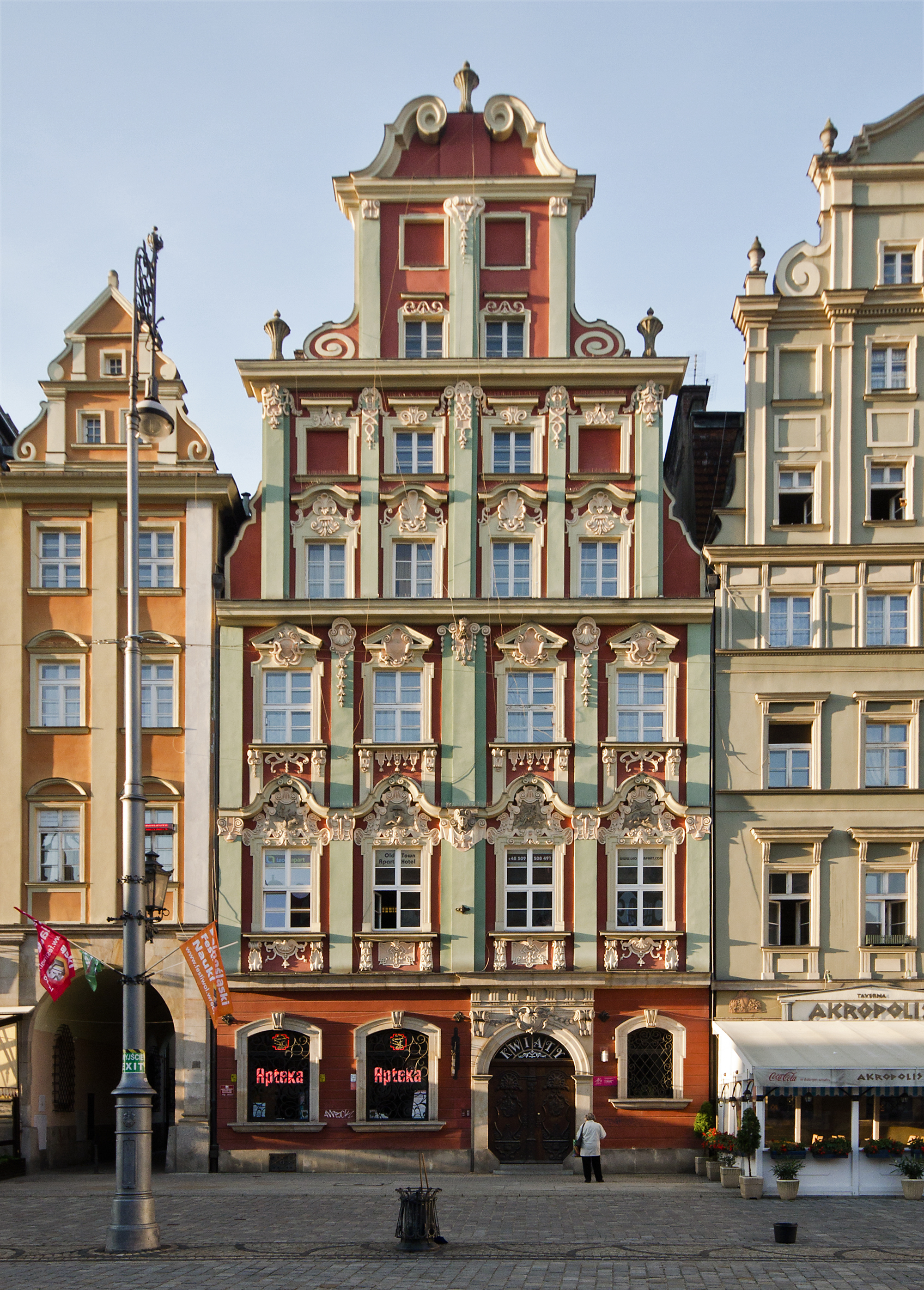 Kamienica Rynek 18, Miasto Wrocław - Stare Miasto